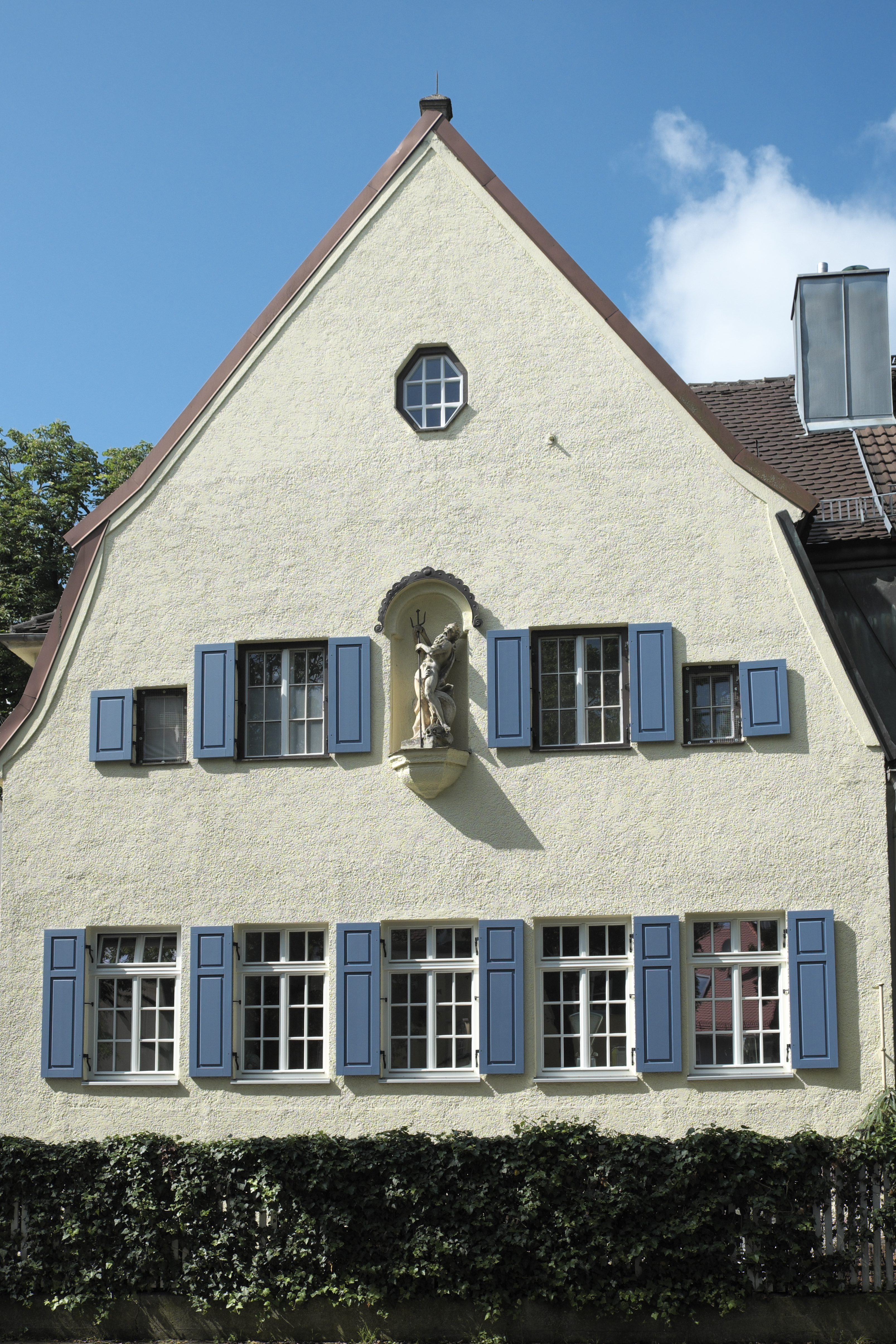 Wohnhaus in der Marschnerstraße 23 in Pasing im Stadtbezirk Pasing-Obermenzing in München (Bayern/Deutschland), 1911 von Edmund Lotterschmid erbaut, mit Neptun-Figur